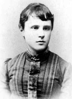 Ганна Баляславаўна МІСУНА